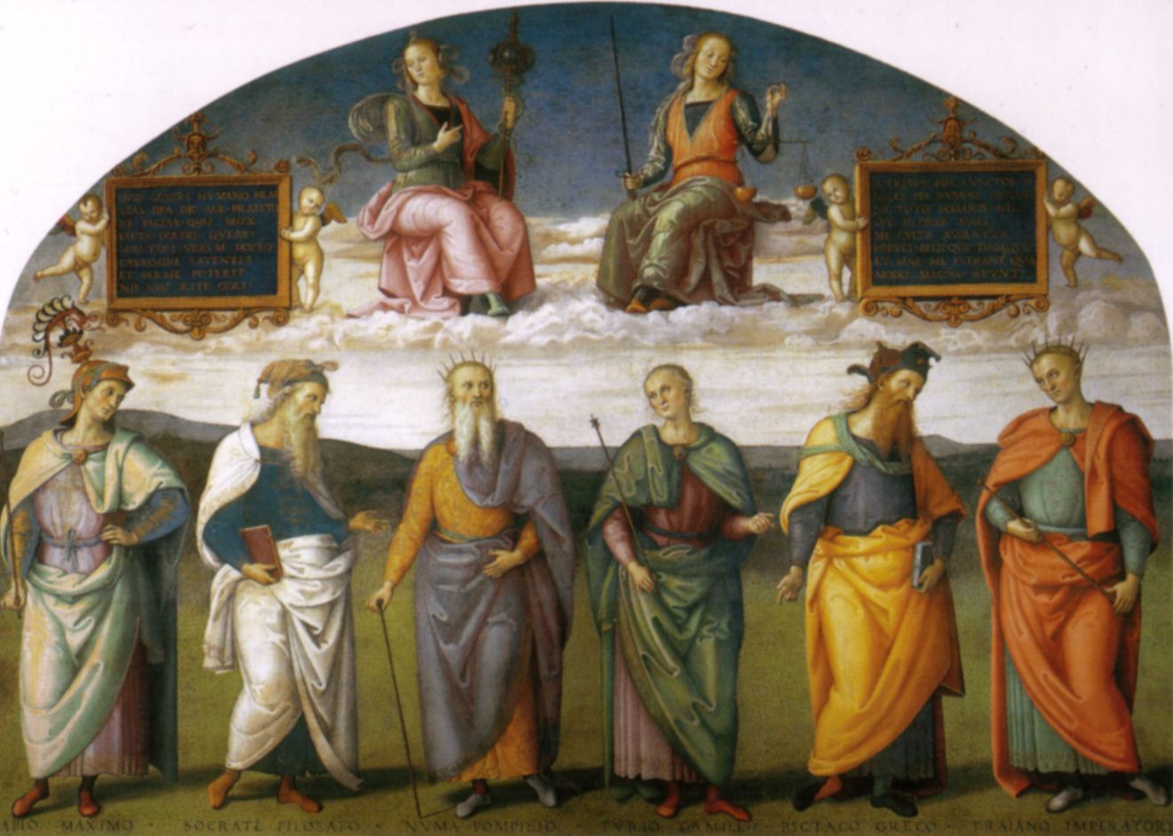 prudence and Justicelabel QS:Len,"prudence and Justice" label QS:Lde,"Klugheit und Gerechtigkeit" label QS:Lit,"prudenza e giustizia"